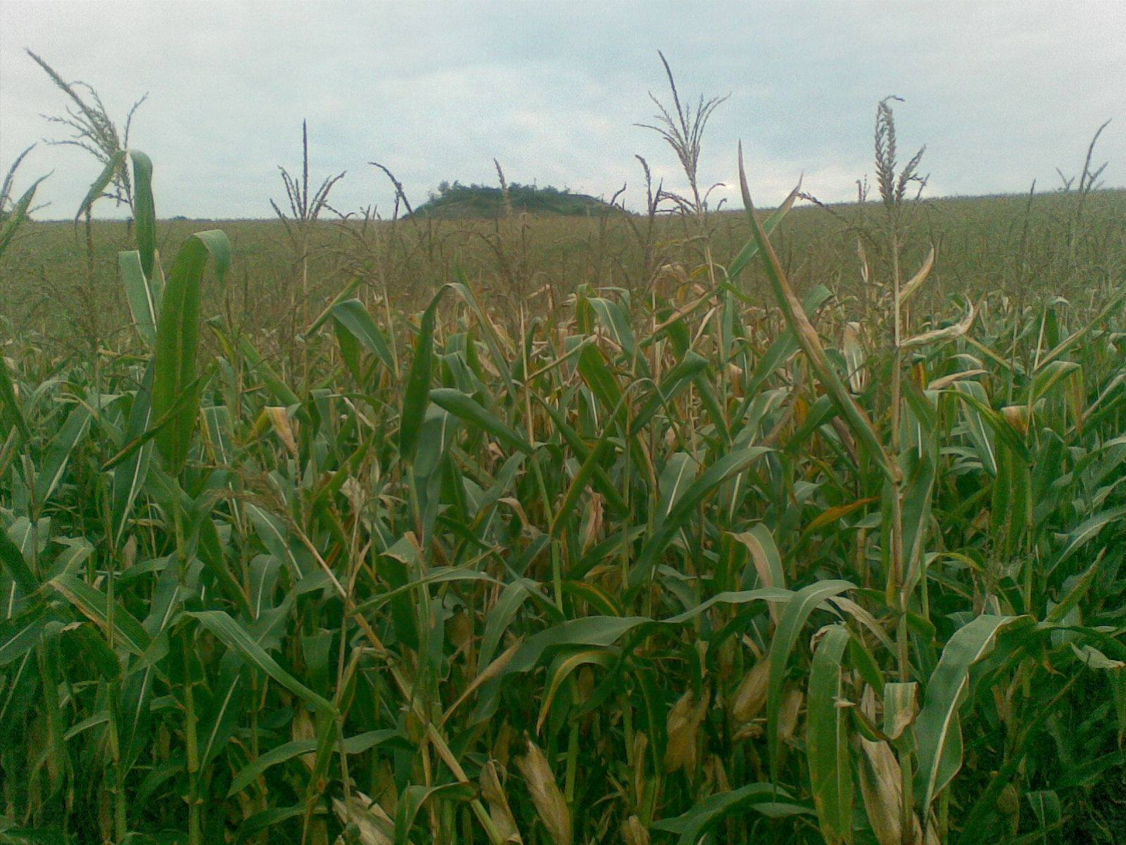 Вид на курган Ошхаца